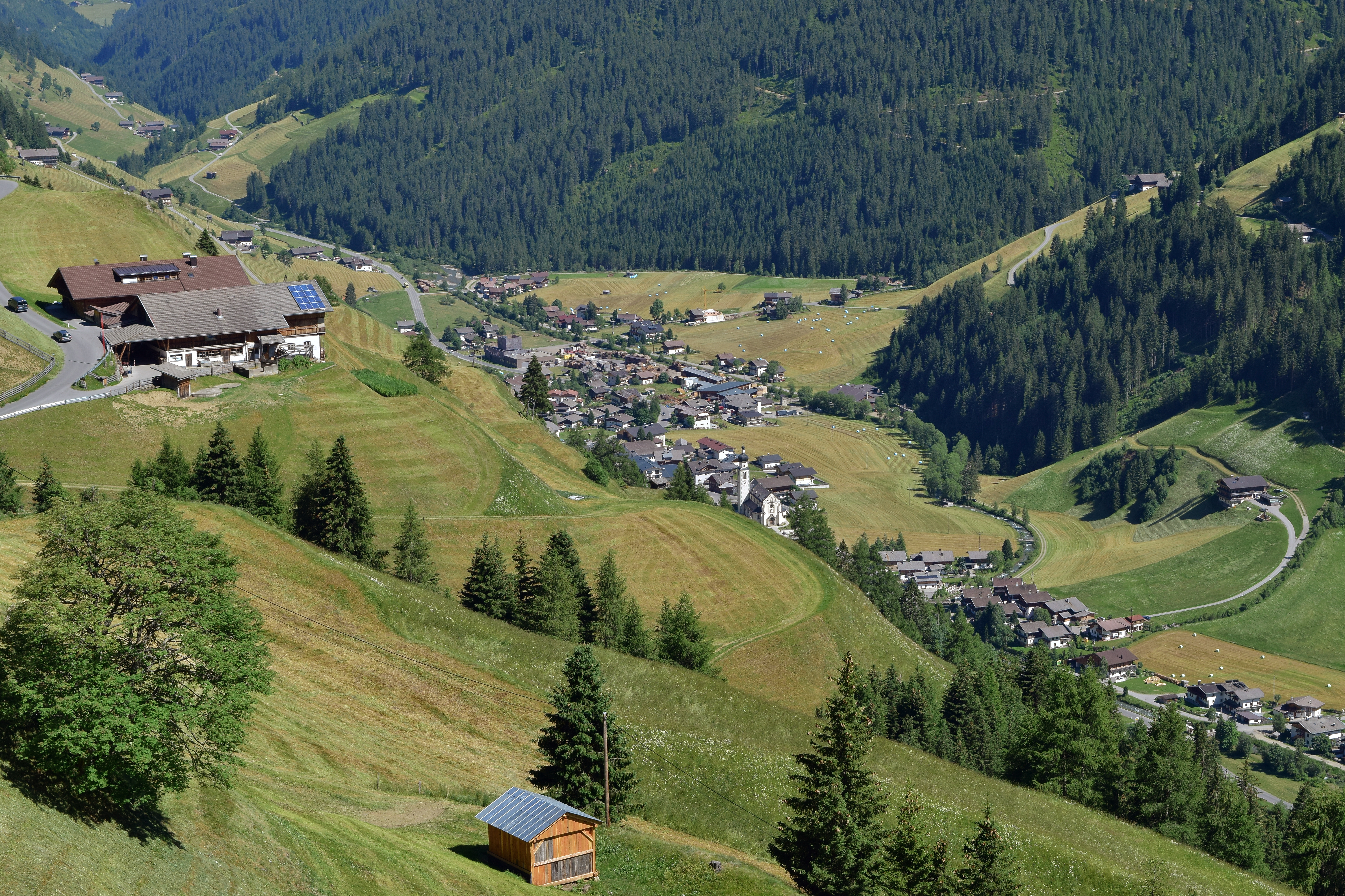 Blick von der Straße bei den Bachlethöfen auf Innervillgraten - links der Goser-Hof